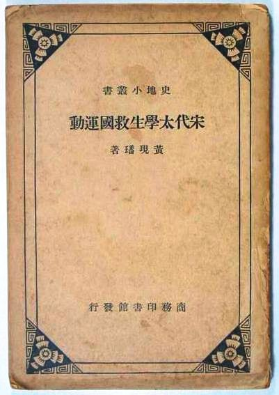 中文（中国大陆）: 此为著作作品第一版（作品初版于1936年）封面，已过50年，进入公共领域。封面摄影作者不明。